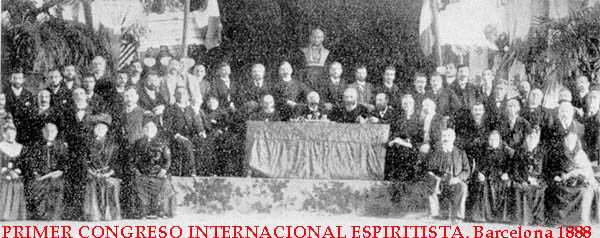 Primer Congreso Internacional Espiritista